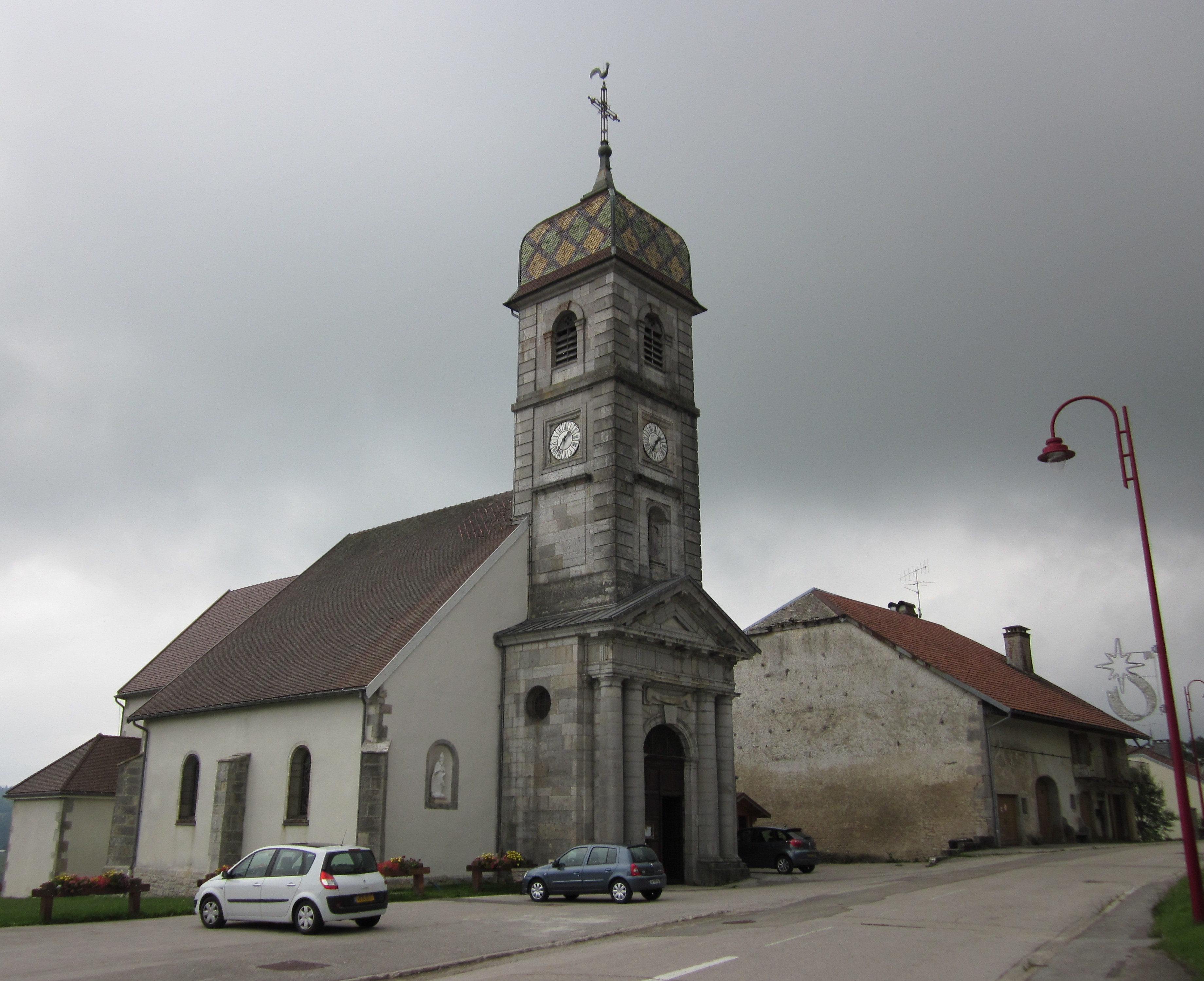 La Chaux-du-Dombief - église à bulbe franc-comtois (Jura français)